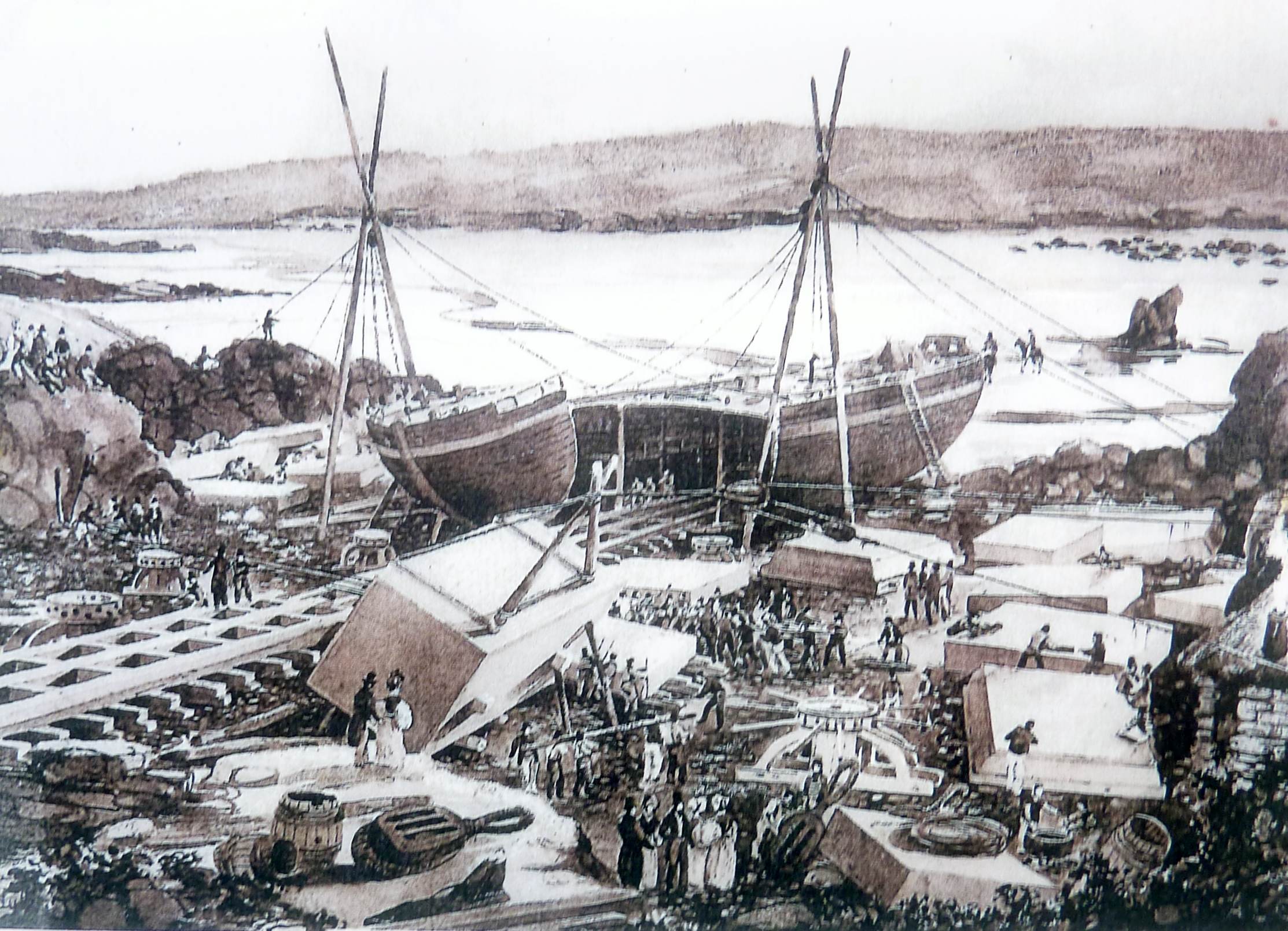 Aber Ildut : chargement des blocs de granite destinés au piédestal de l'obélisque de Louxor, place de la Concorde à Paris ; le Luxor, navire chargé du transport, a été scié en deux pour permettre le chargement des blocs dont le plus gros pèse près de 100 tonnes (dessin anonyme, 1835).